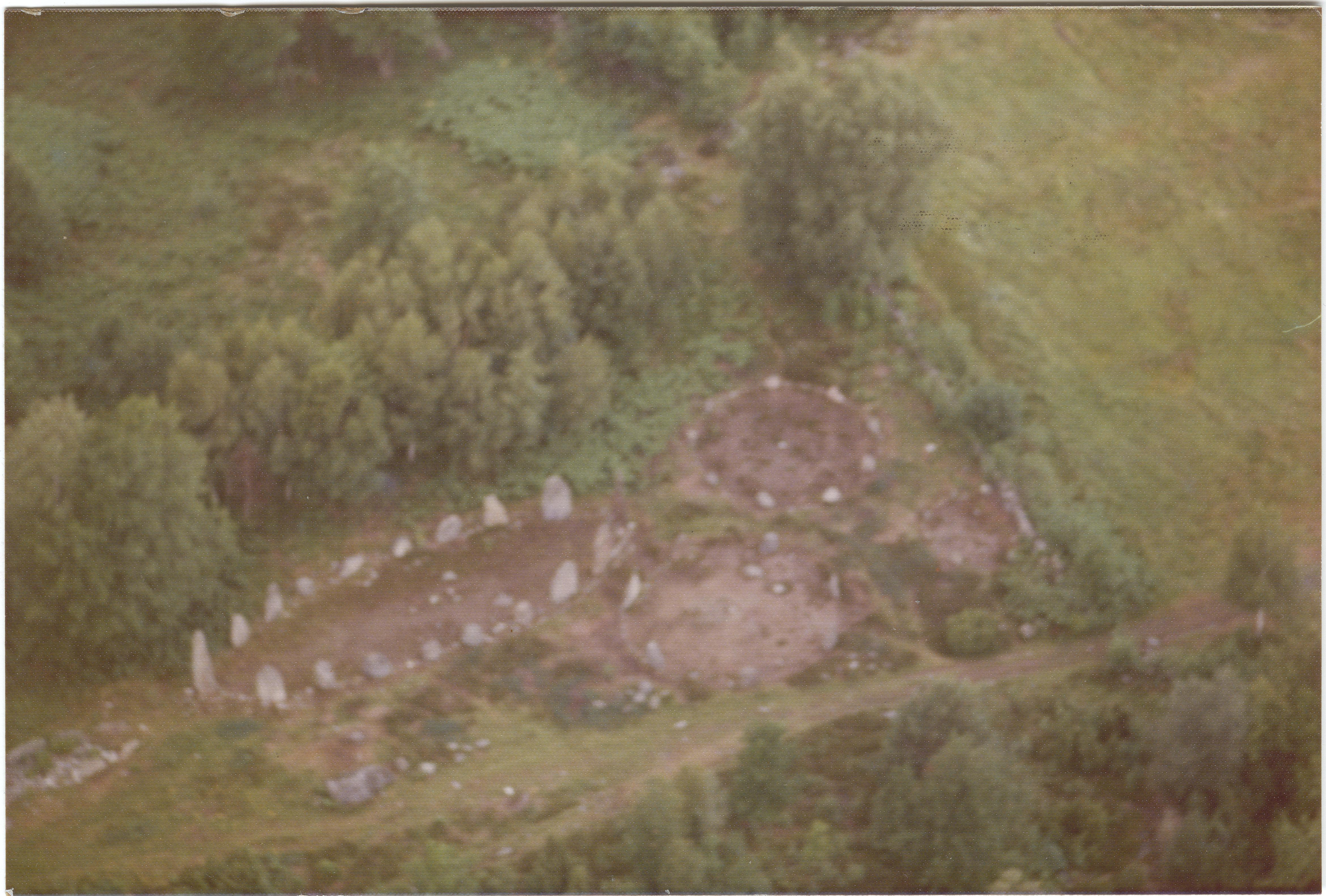 WF.HL.Uten_nummer.004 Gravplass fra jernalderen.